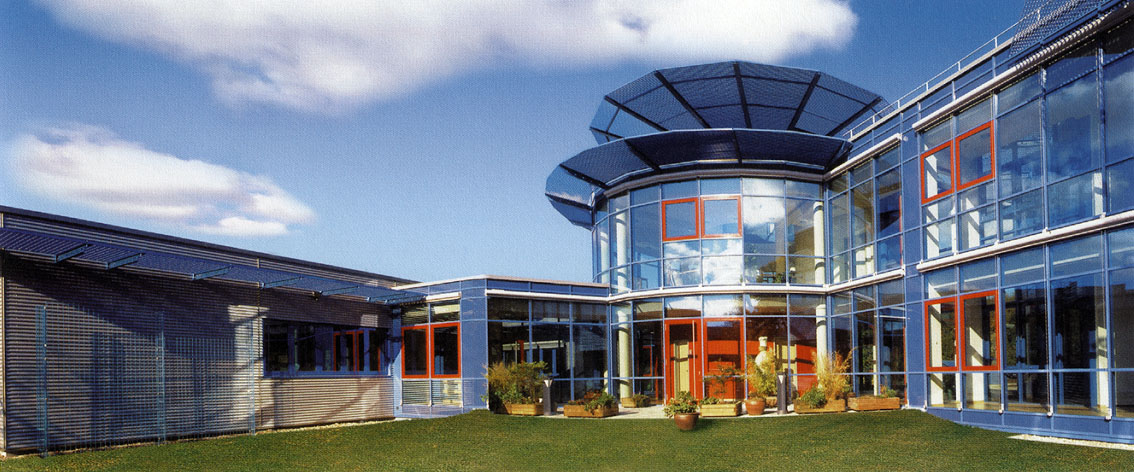 Technologiezentrum Ahrensburg